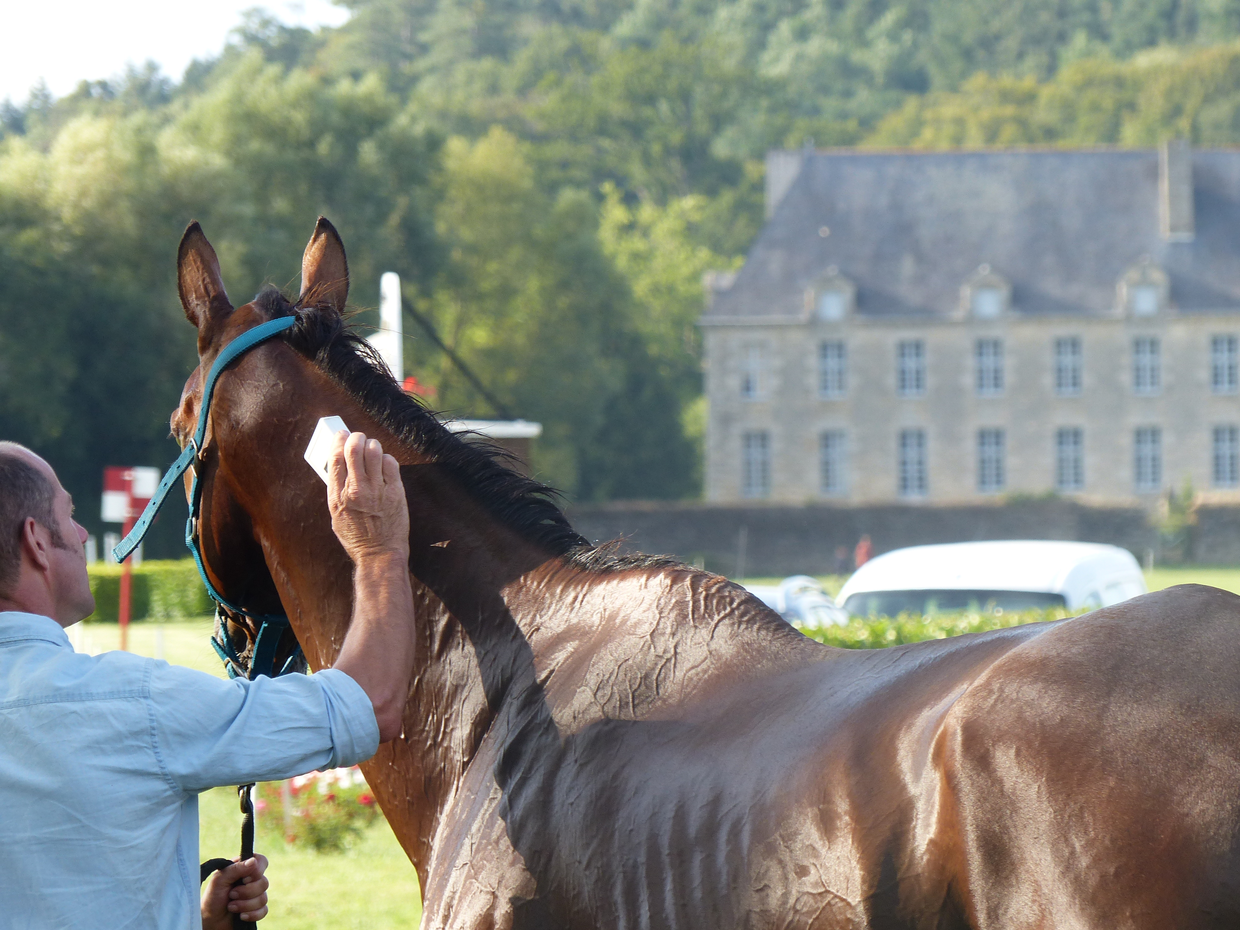 Identification de la puce électronique d'un Pur-sang, à Josselin